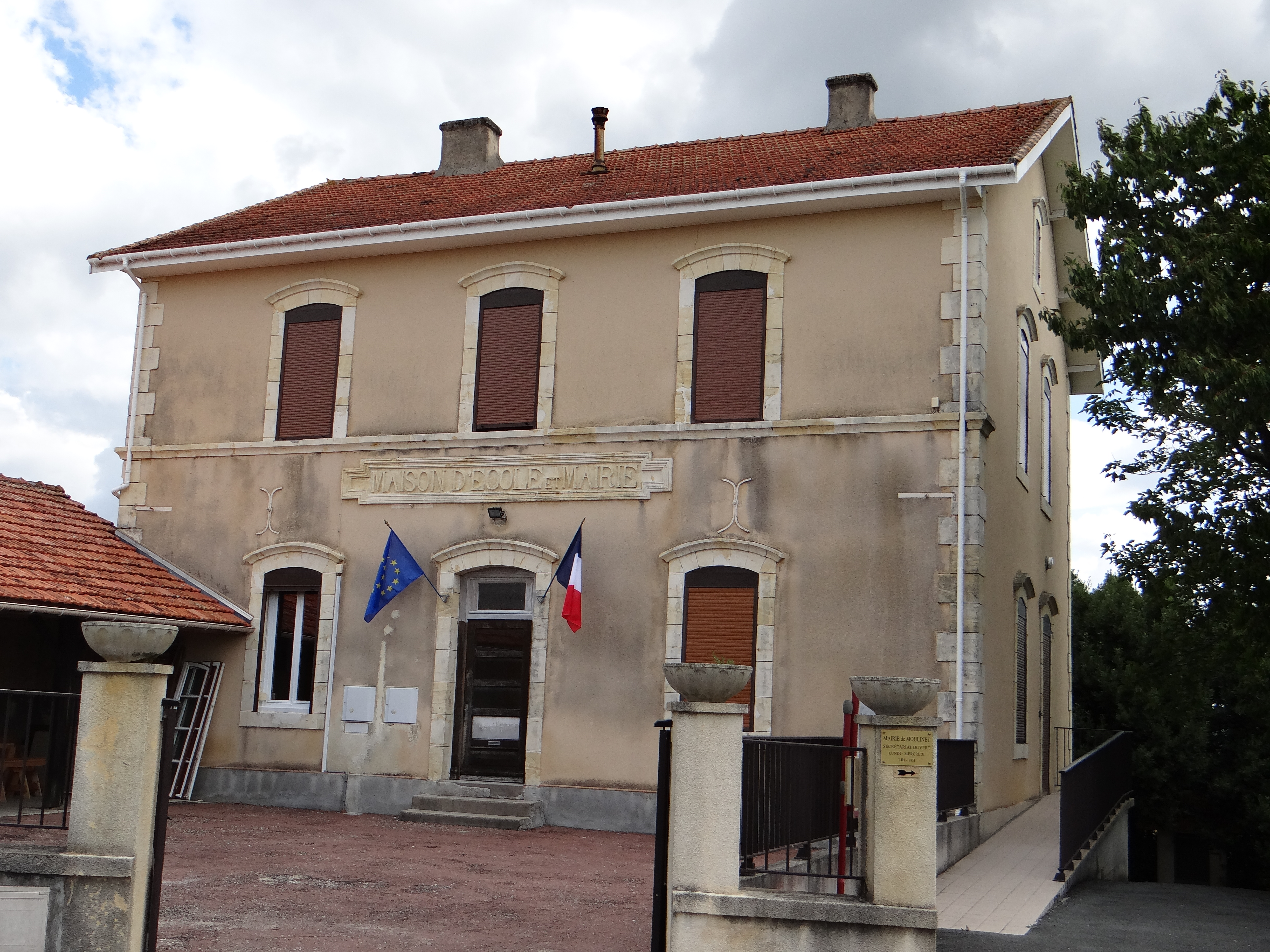 Moulinet (Lot-et-Garonne) - Mairie